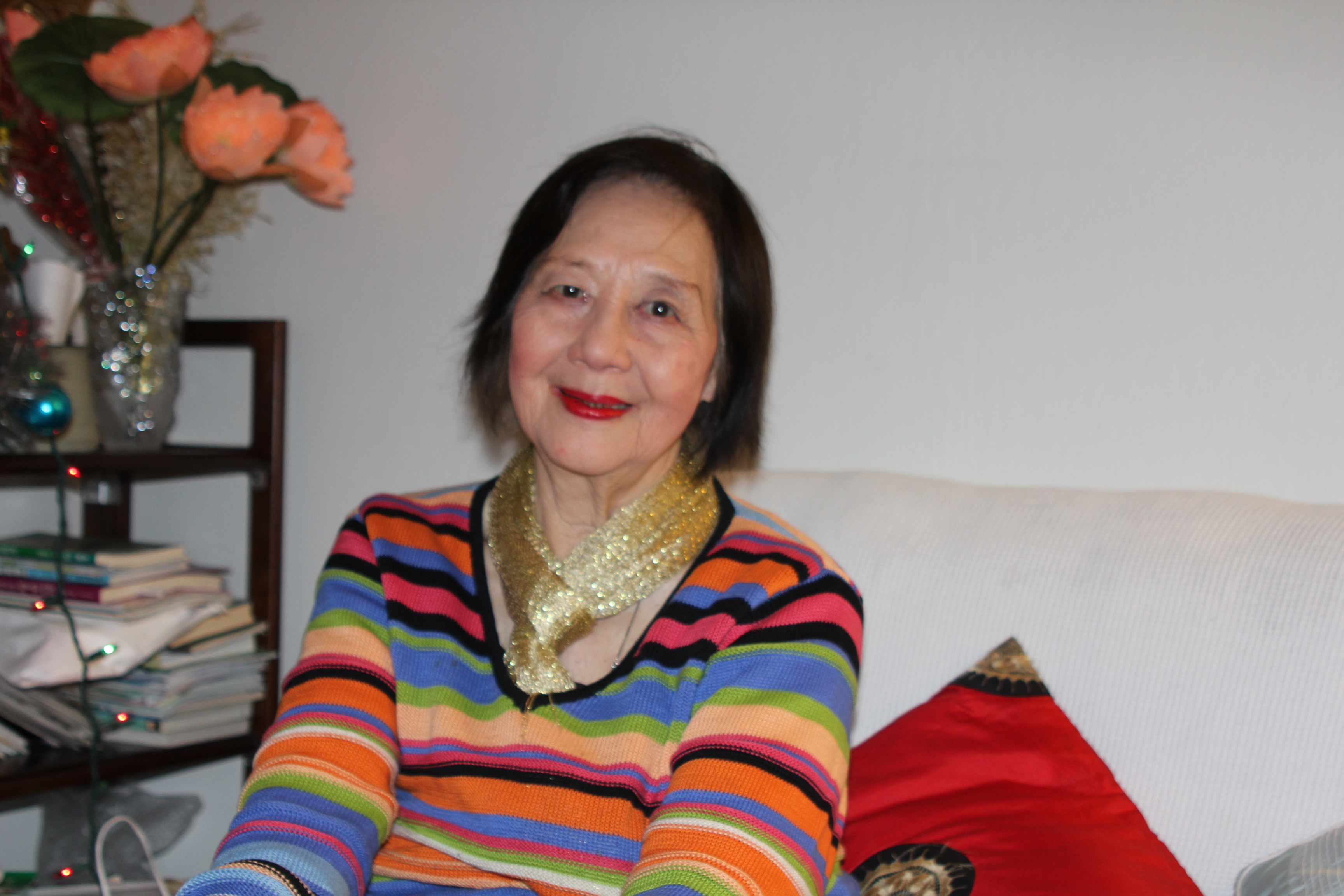 攝于梁萍家中，2013 New Year eve